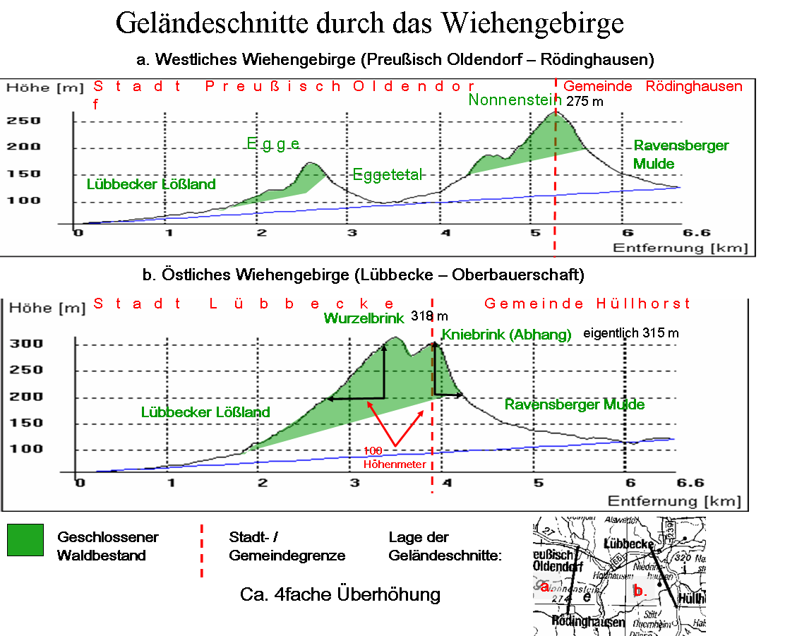 Geländeschnitte durch das Wiehengebirge in Nordrhein-Westfalen. Schnitt A: Preußisch Oldendorf-Rödinghausen (durch das Eggetal und Nonnenstein. „Virtuelle Kameraposition“ für den Schnitt A: Schnitt B: Lübbecke-Oberbauerschaft